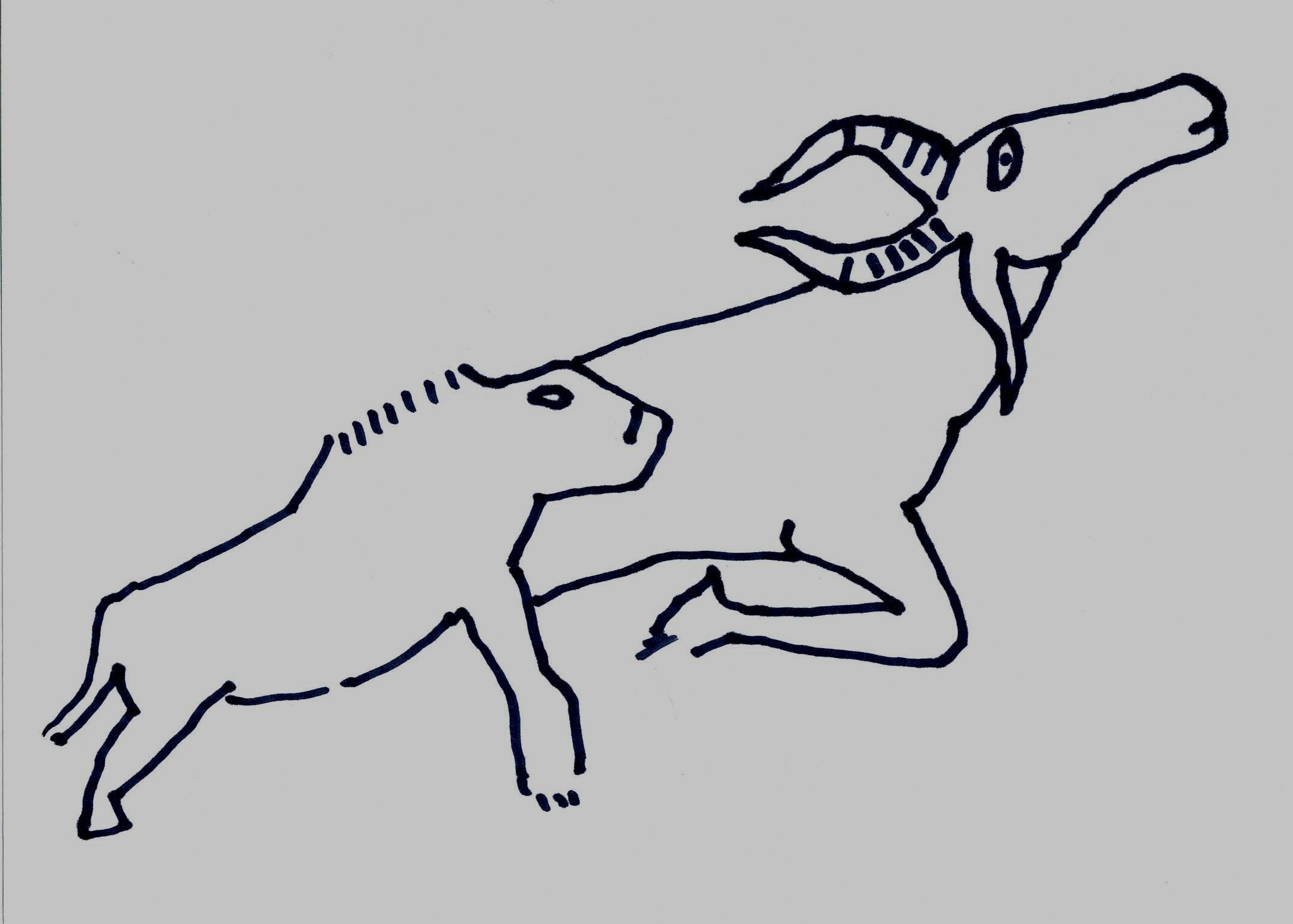 Gravure préhistorique de Zaccar, région de Djelfa, Algérie, croquis schématique (lion et antilope)